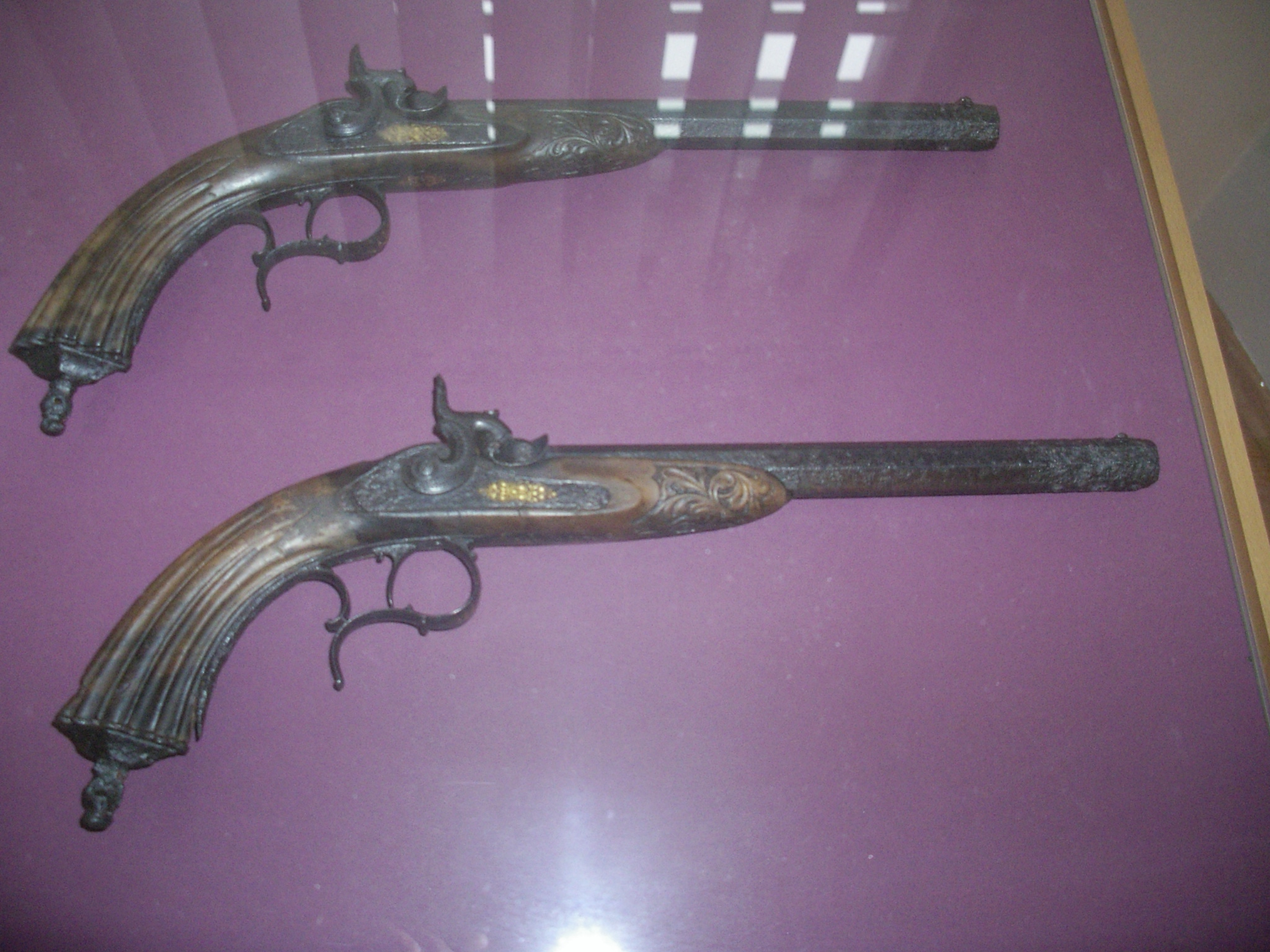 Pistoletai eksponuojami Žemaičių vyskupystės muziejuje (Biržuvėnų dvaro lobis)